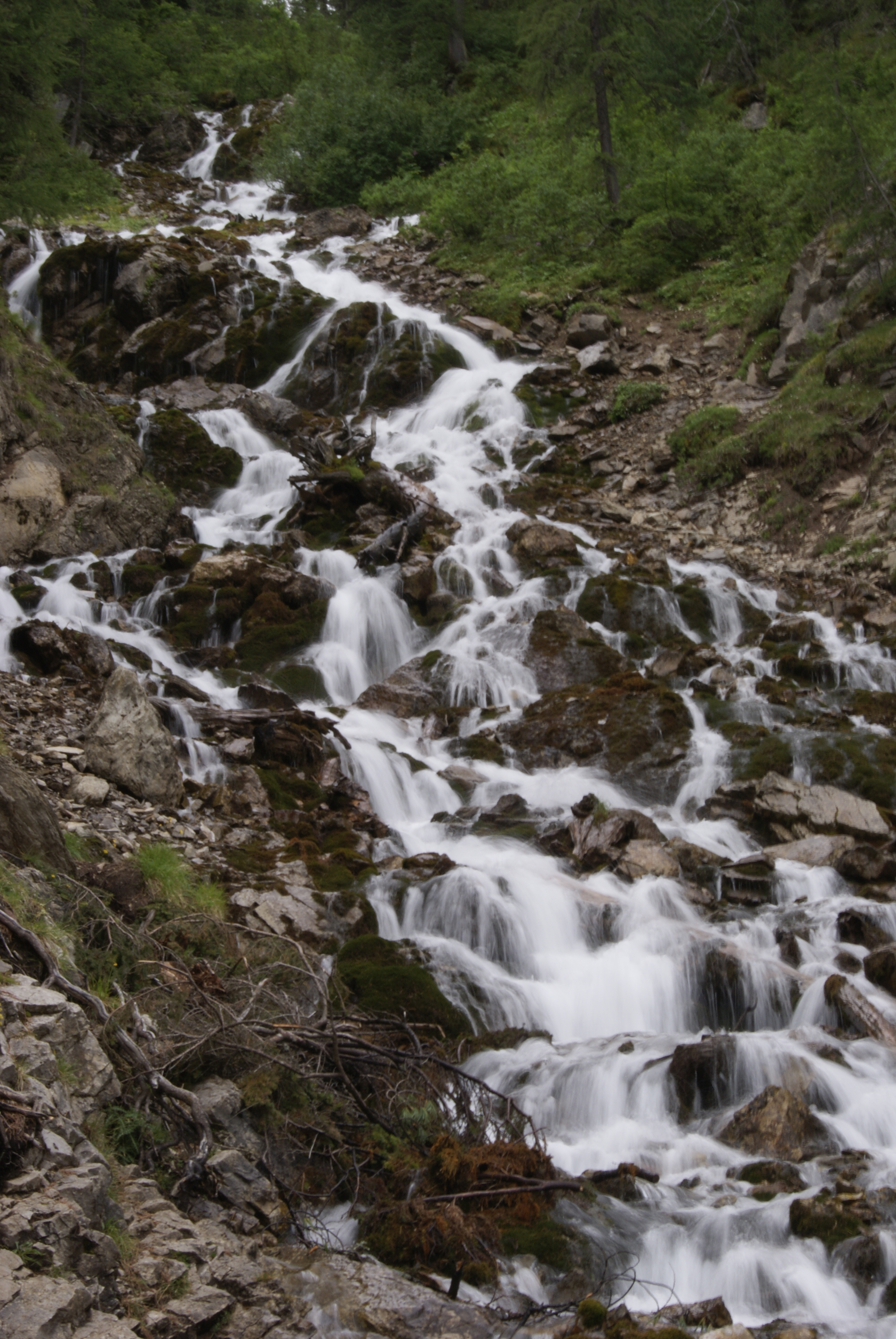 Visuale del ramo principale delle cascate di Jonta, nella Val San Nicolò.